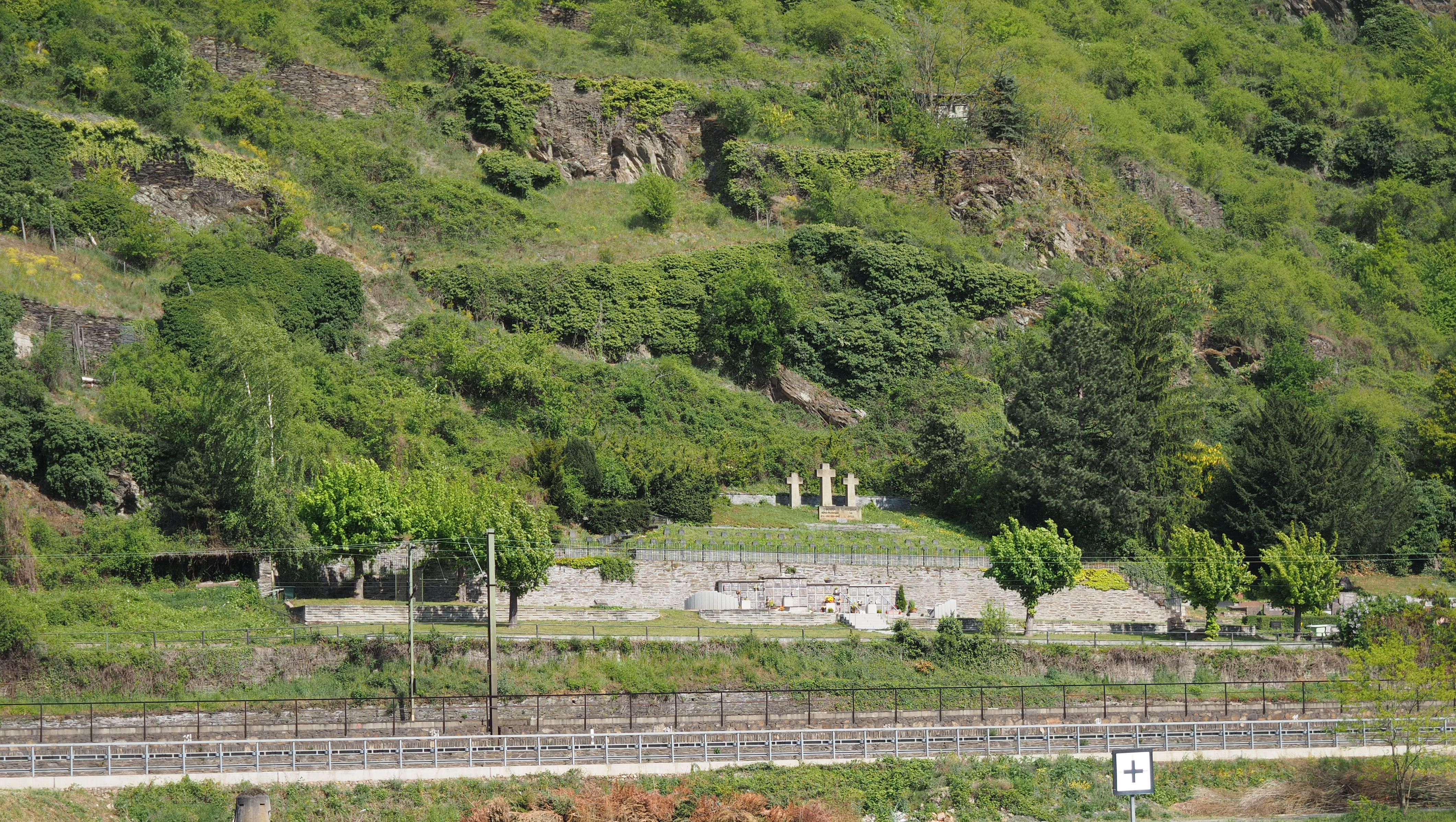 Ehrenfriedhof Kriegsgräberstätte Kaub